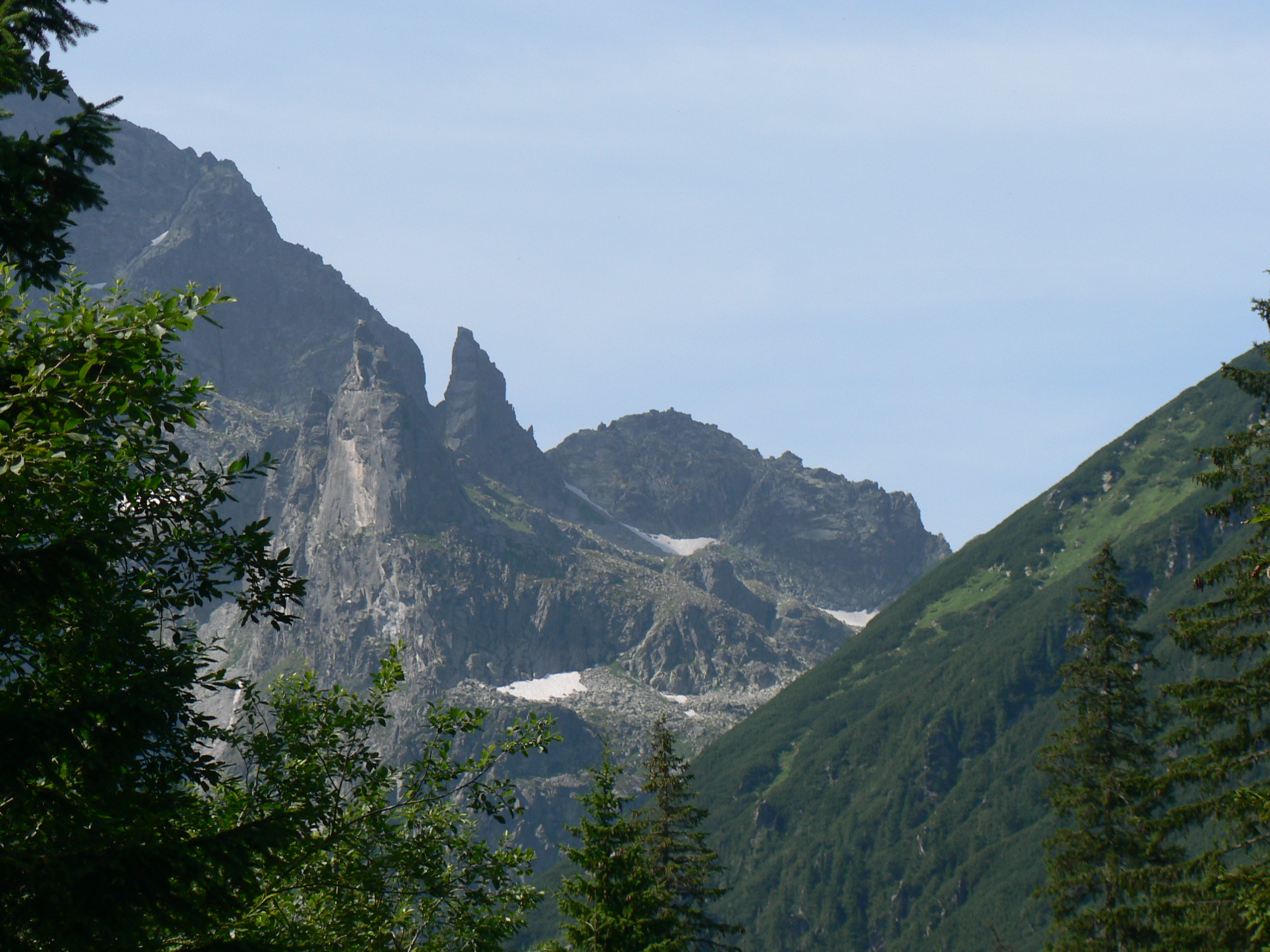 Mnich, Zadni Mnich i Ciemnosmreczyńska Turnia z drogi nad Morskie Oko